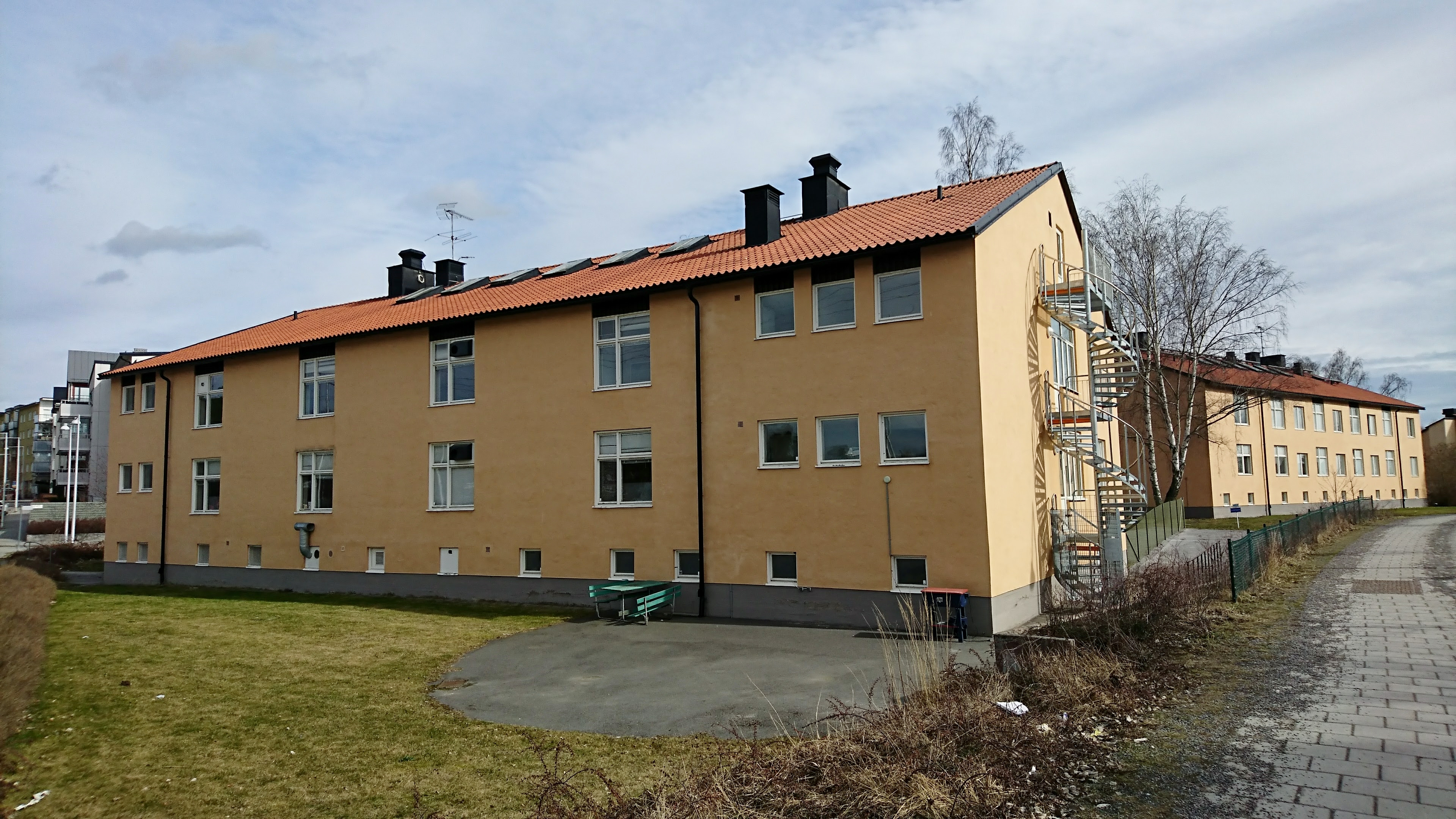 Byggnader i Järvastaden. Före detta militär kaserner tillhörande Första intendenturkompaniet (Int 1) åren 1944–1949 och senare Infanteriets kadettskola (InfKAS) åren 1949–1961. Artilleri och ingenjörofficersskolan (1964–1970) och Värnpliktsverket åren 1968–1994.